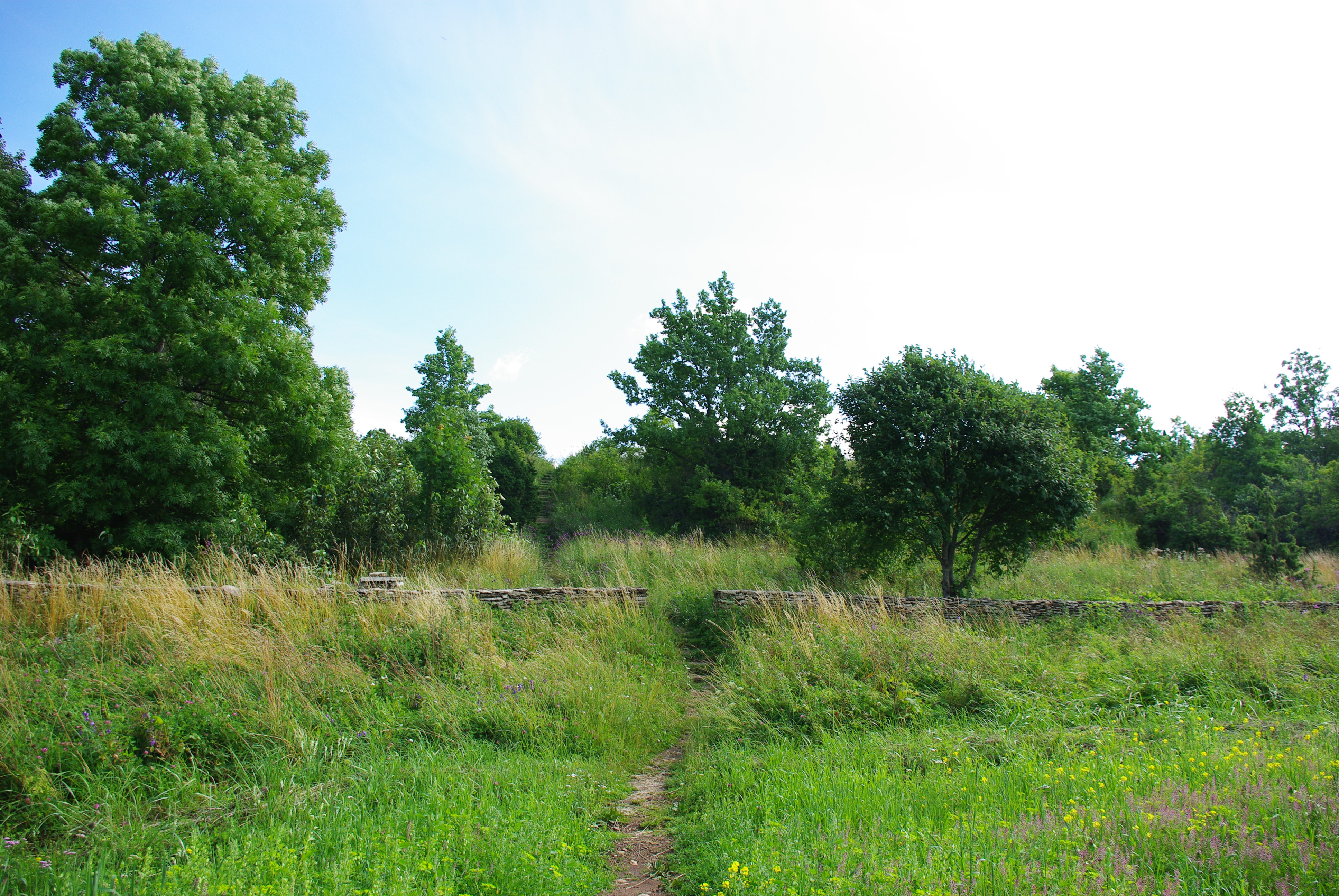 Metsarada linnamäe põja poolsele nõlvale